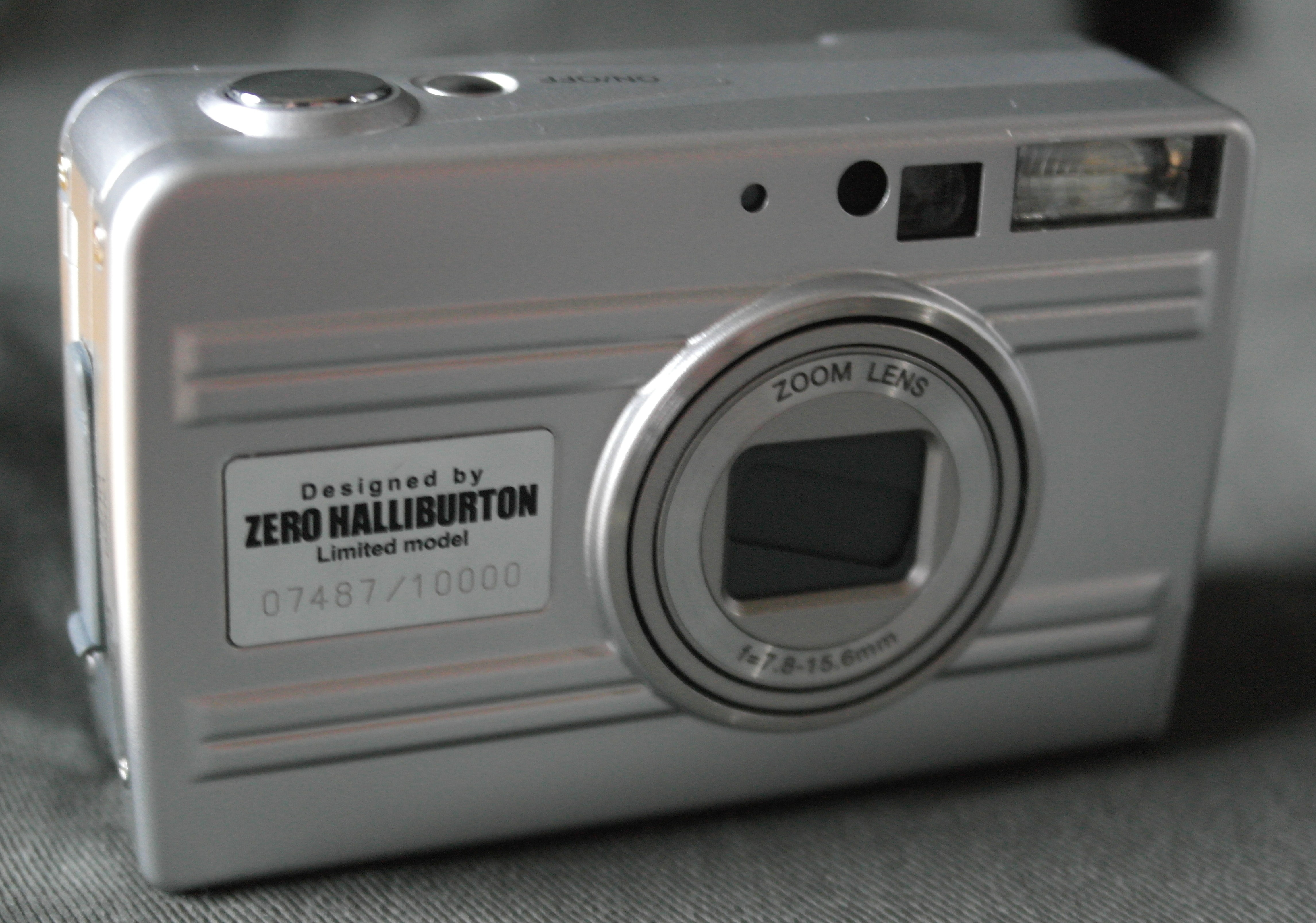 スーツケースメーカーのゼロハリバートンとコラボしたマクセルのコンパクトデジタルカメラ 外観はスーツケースを模しているが、スーツケース並みの堅固さは伴わない